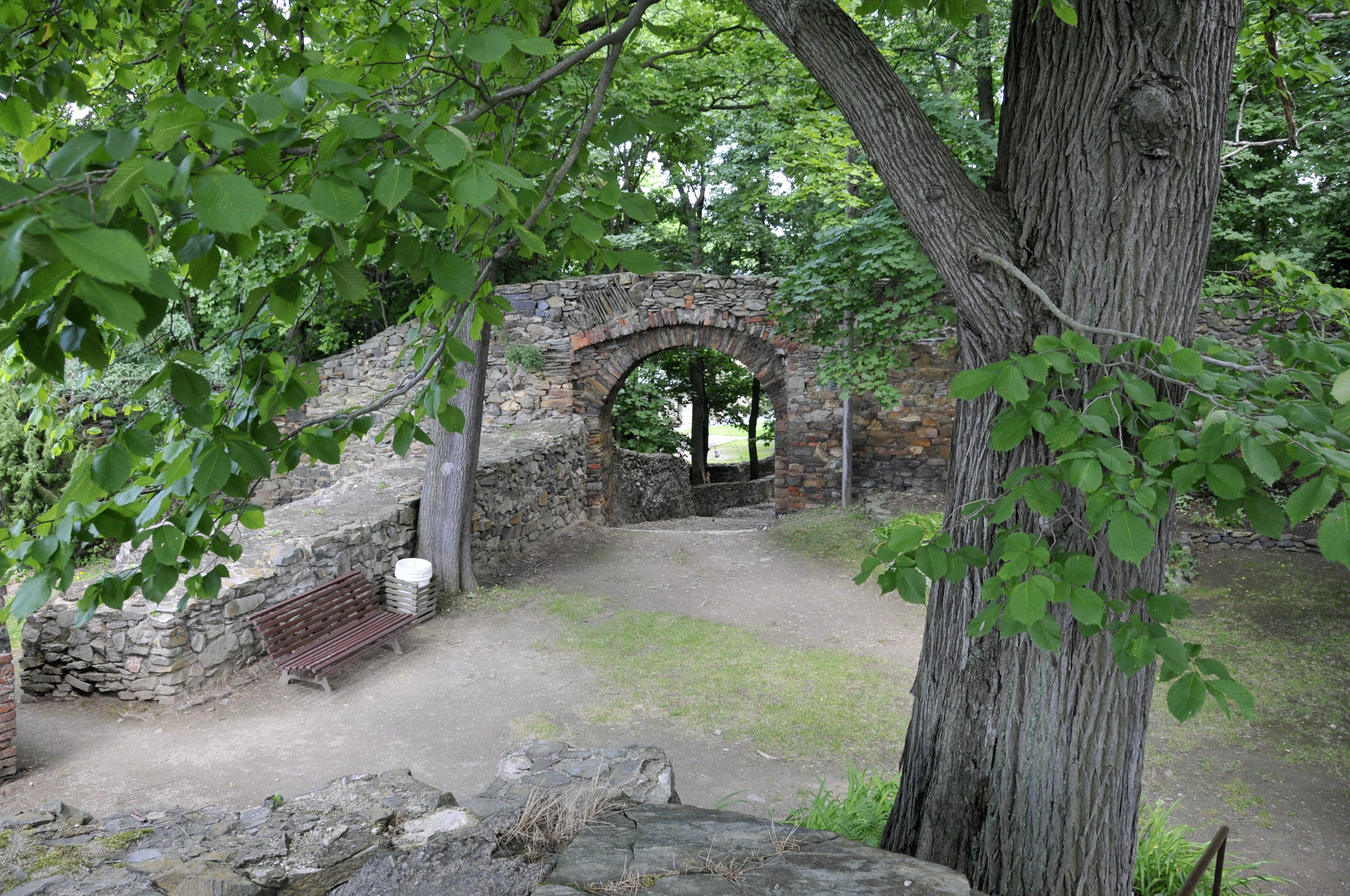 Burgruine Reichenfels Burghof